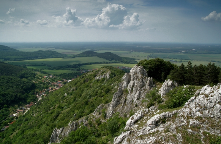 Pohled na Plavecký Mikuláš z Krslenice.